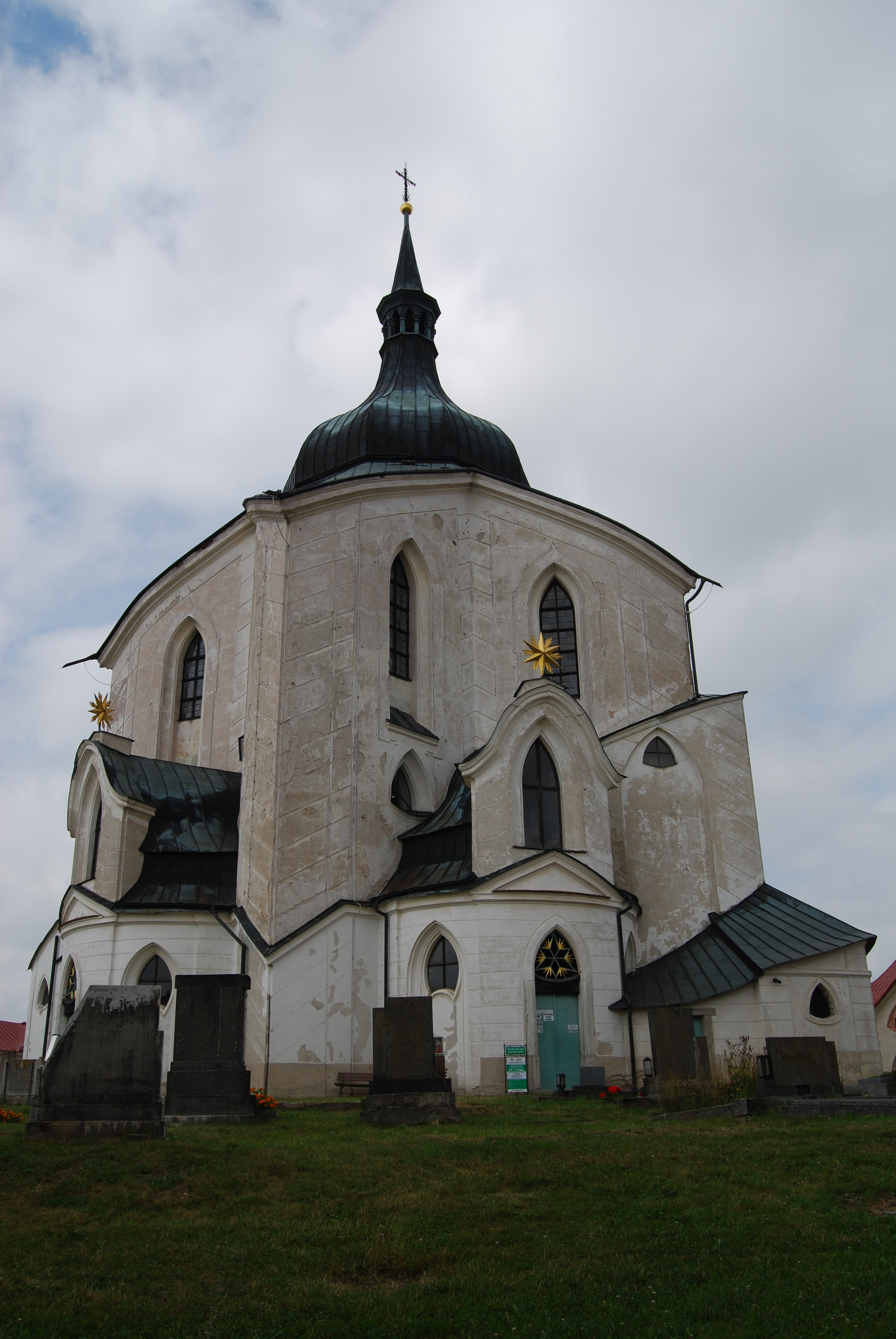 Kostel svatého Jana Nepomuckého (Žďár nad Sázavou) u okresního města Žďár nad Sázavou. Česká republika. Object location49° 34′ 48.78″ N, 15° 56′ 31.03″ E